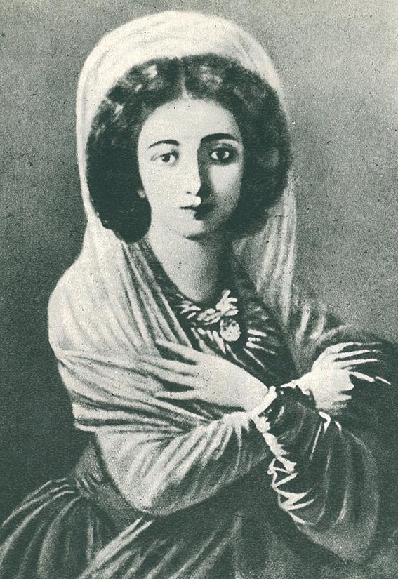 Zofia Glawani primo voto Wittowa (de Witte), secundo voto Potocka (1760–1822), die "schöne Bithynierin"